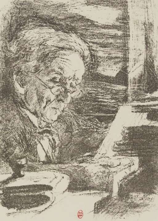 estampe